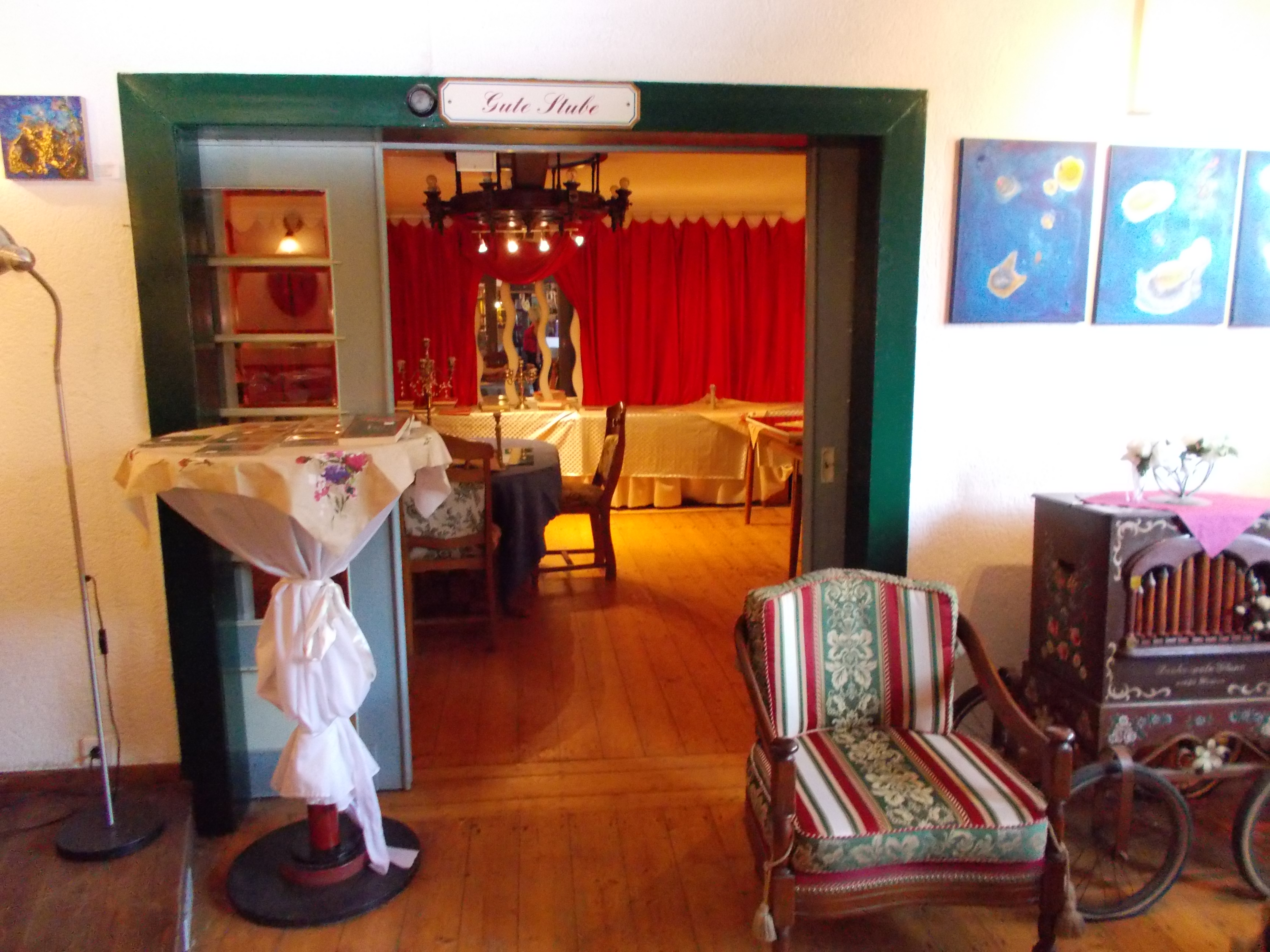 Innenansichten der Fünte in Mülheim an der Ruhr. Die "Gute Stube" war einst der Pferdestall der ehemaligen Posthalterei.